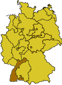 Karte der Evangelischen Landeskirche in Baden